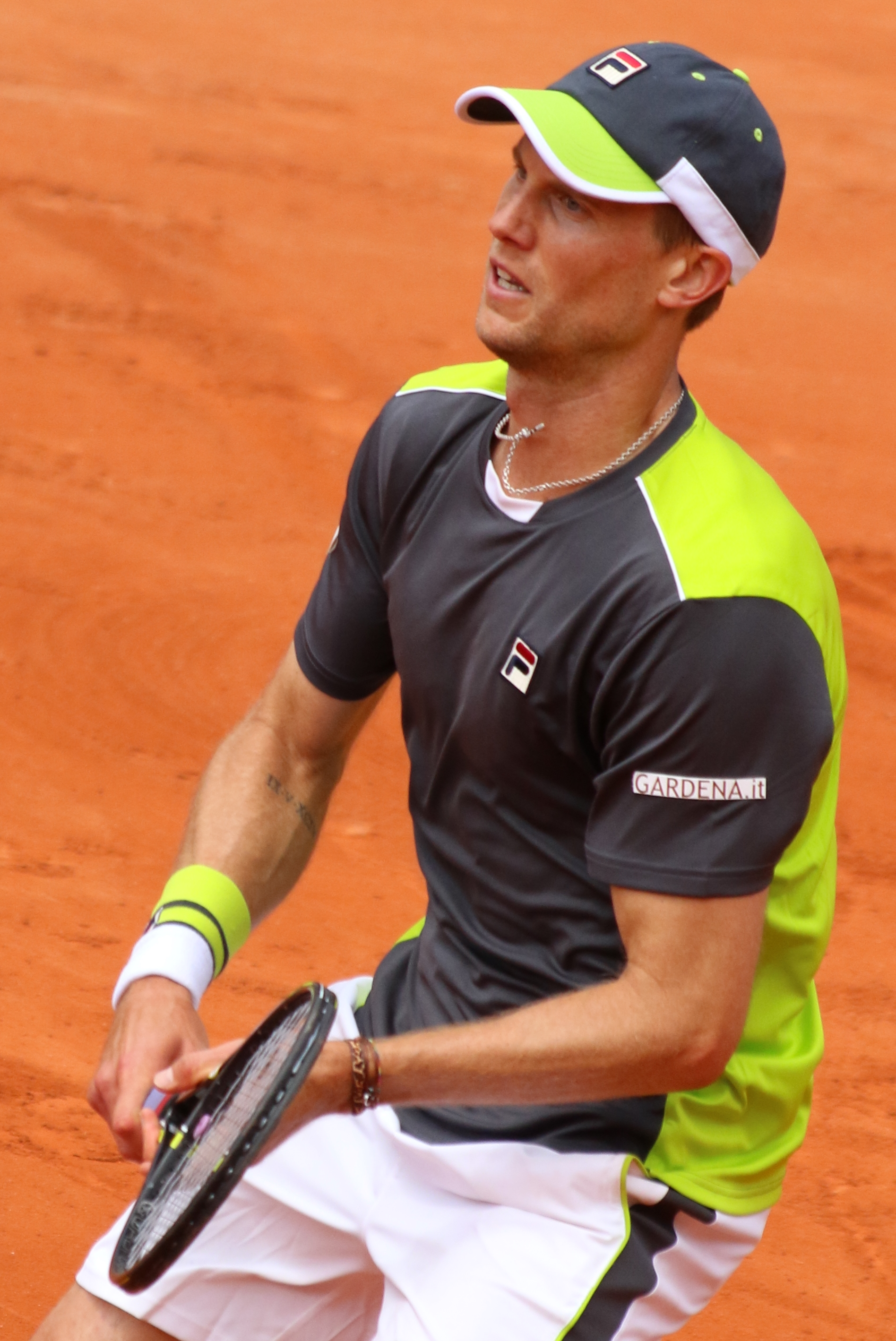 Seppi RG19 (17)